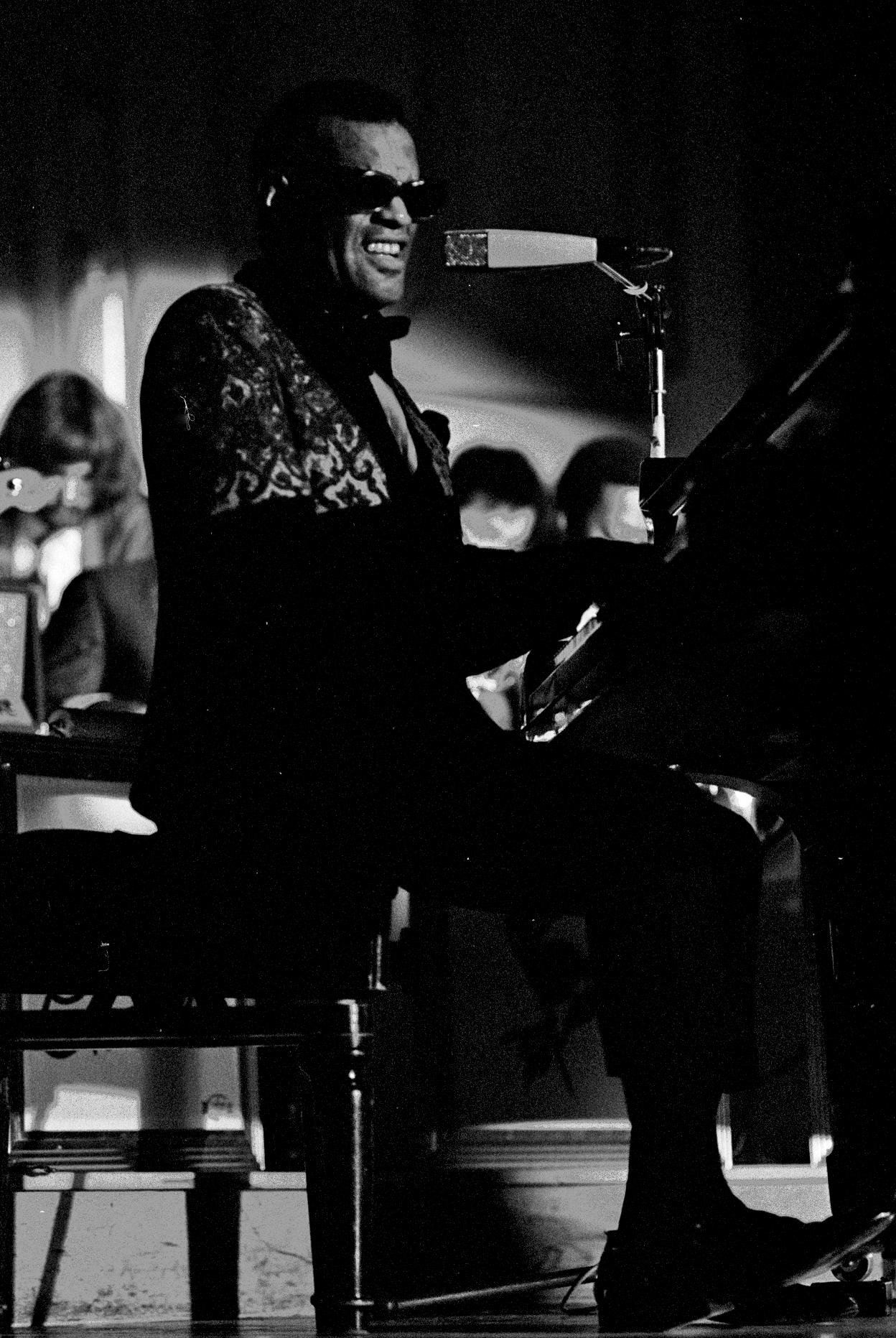 Ray Charles in der Hamburger Musikhalle, September 1971